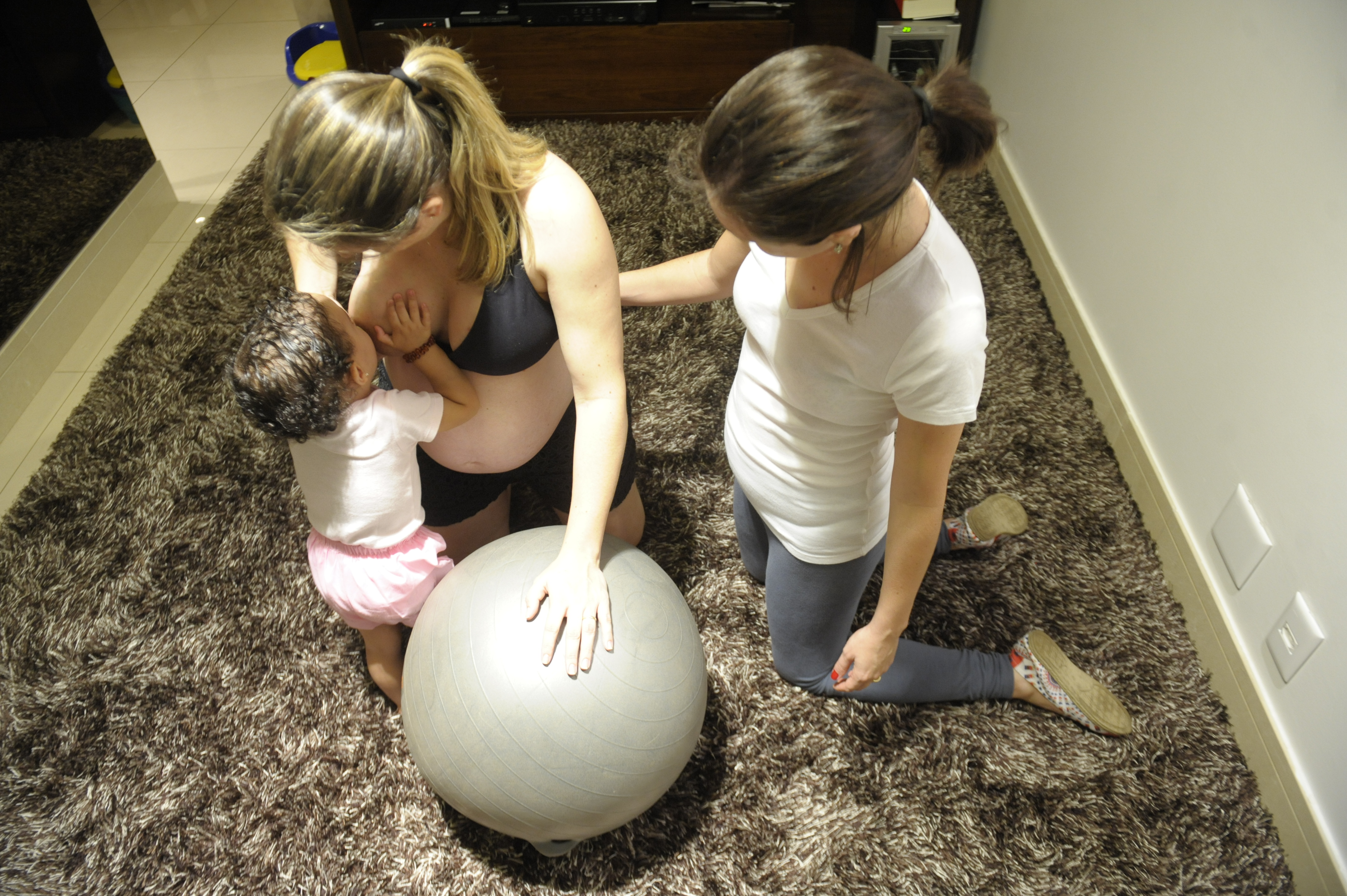 Doulas oferecem orientação, suporte físico e emocional à família na gravidez e no parto. A doula Jéssica Macêdo orienta Luciana Rodovalho sobre posições, exercícios e cuidados que ajudam a gestante a se sentir mais confortável no final da gravidez e aliviam as dores no trabalho de parto, como banho, posição de "cavalinho" e apoio de bola. Foto: Jefferson Rudy/Agência Senado